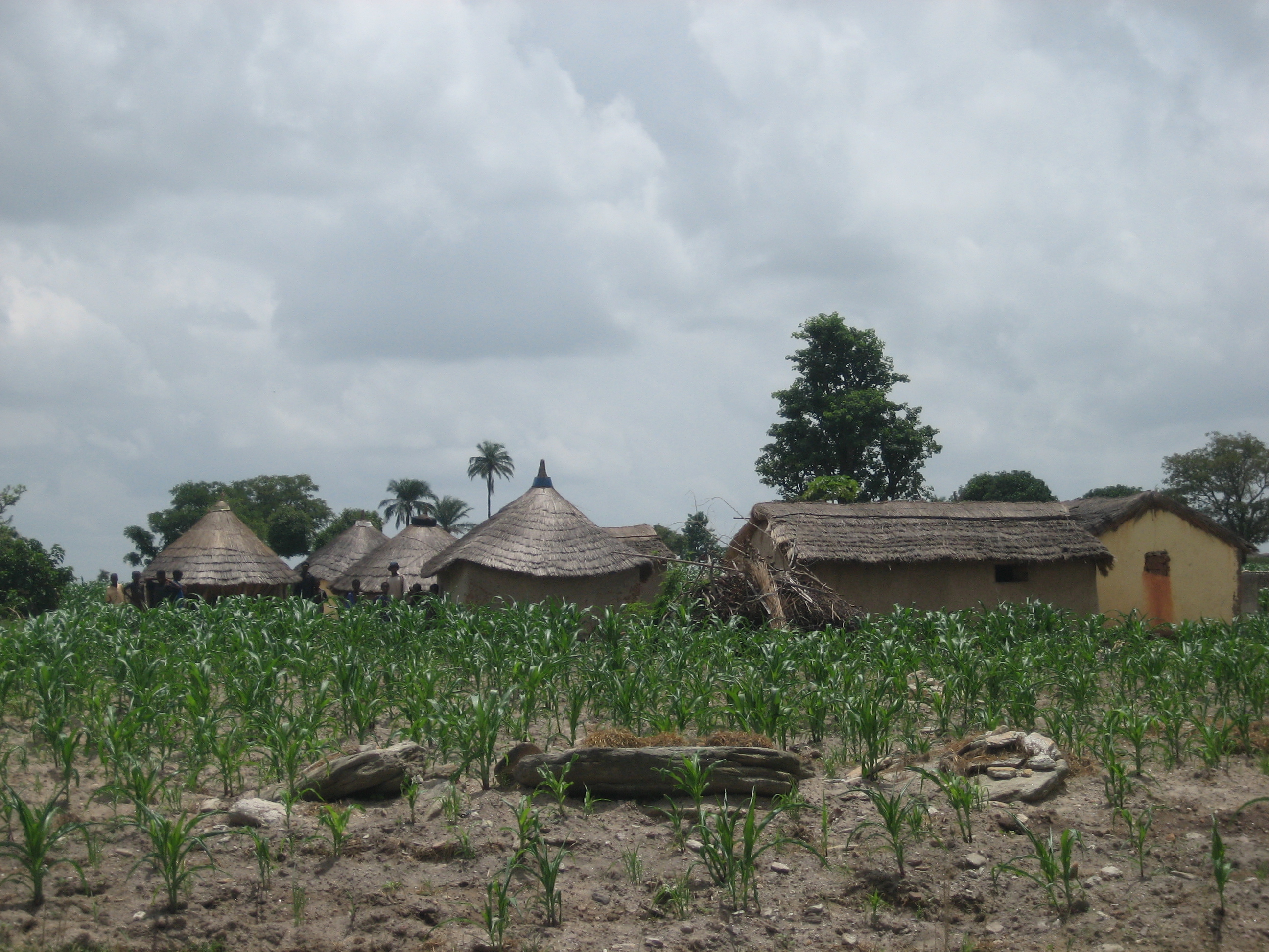 village in Bomma